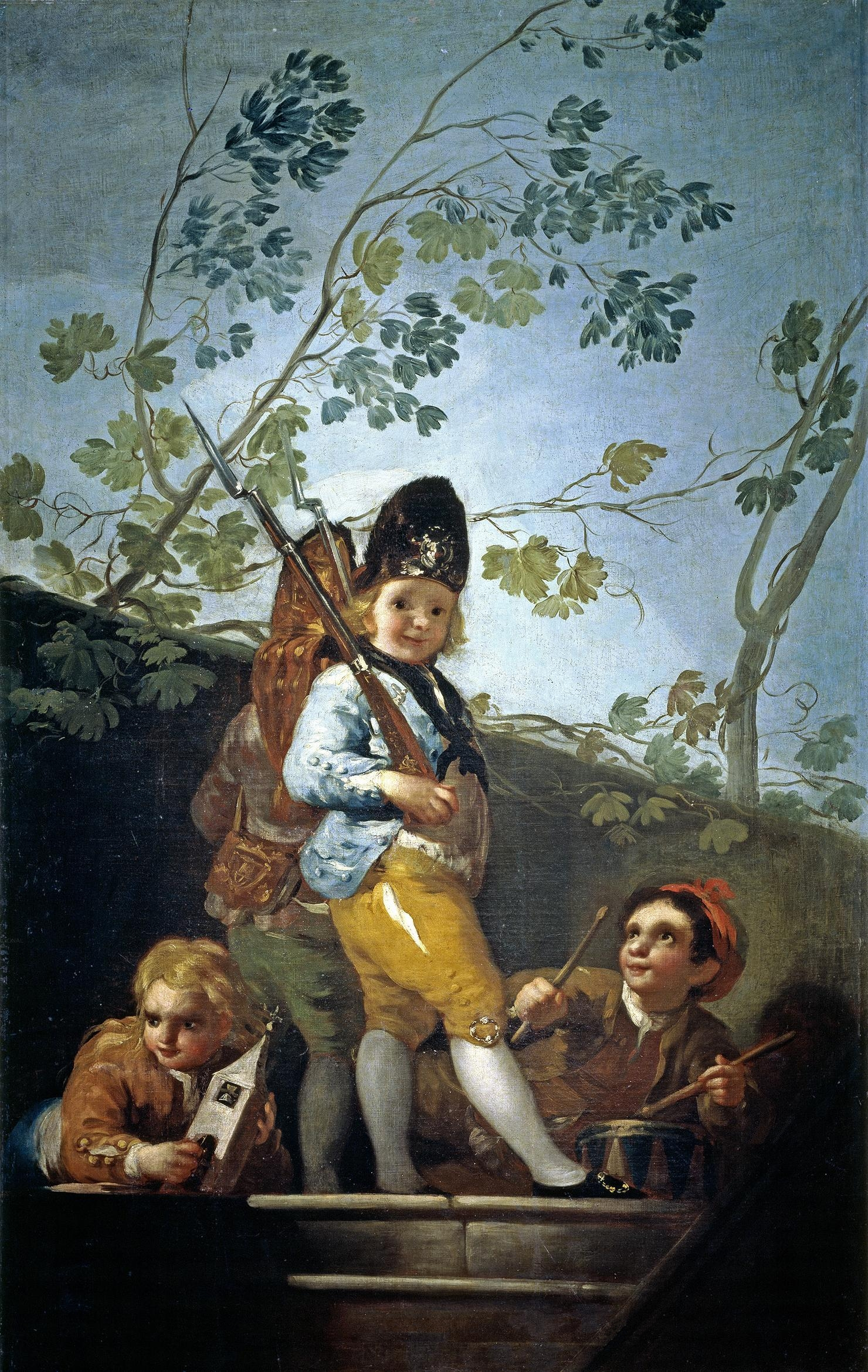 Muchachos jugando a soldadoslabel QS:Les,"Muchachos jugando a soldados"